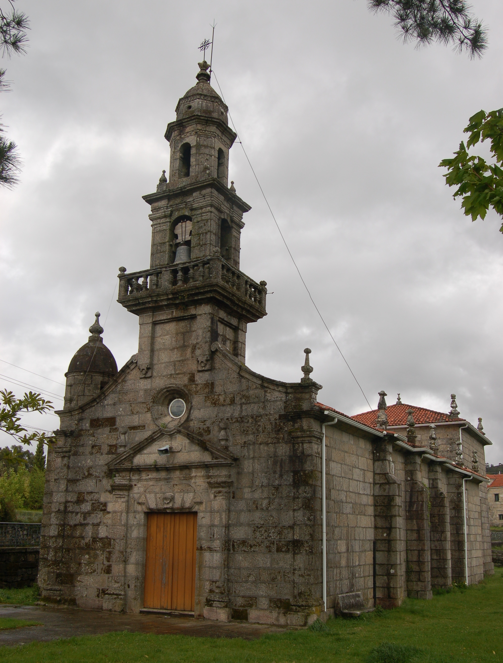 Igrexa parroquial de San Salvador da Lama (A Lama)